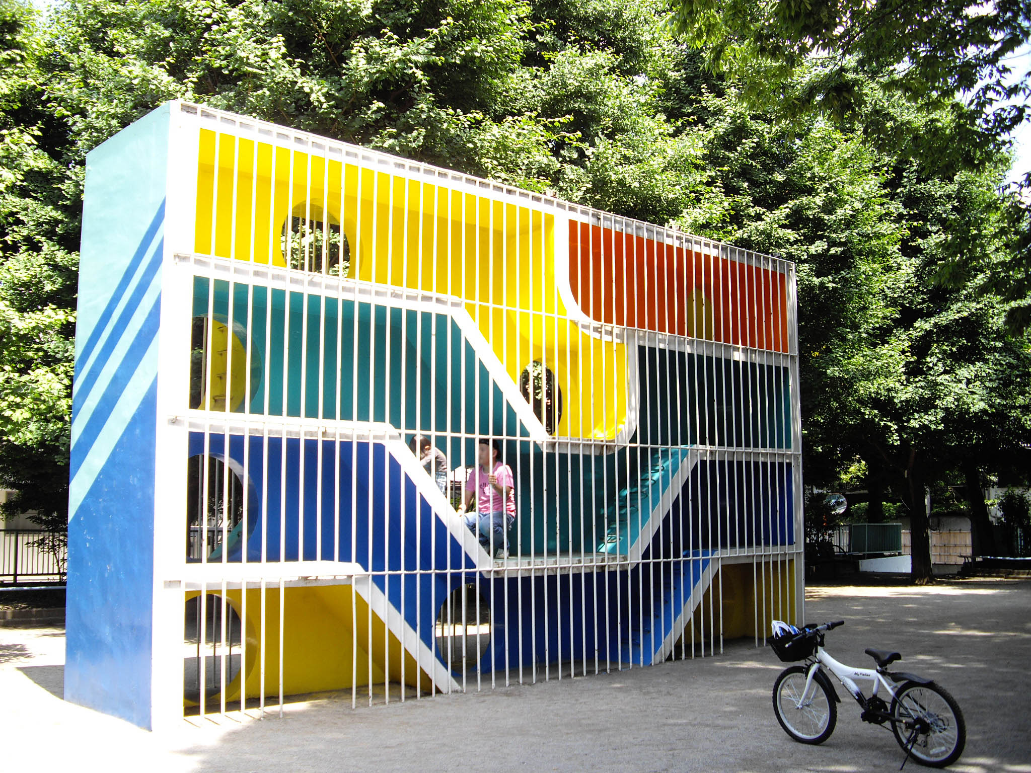 世田谷区立こどものひろば公園